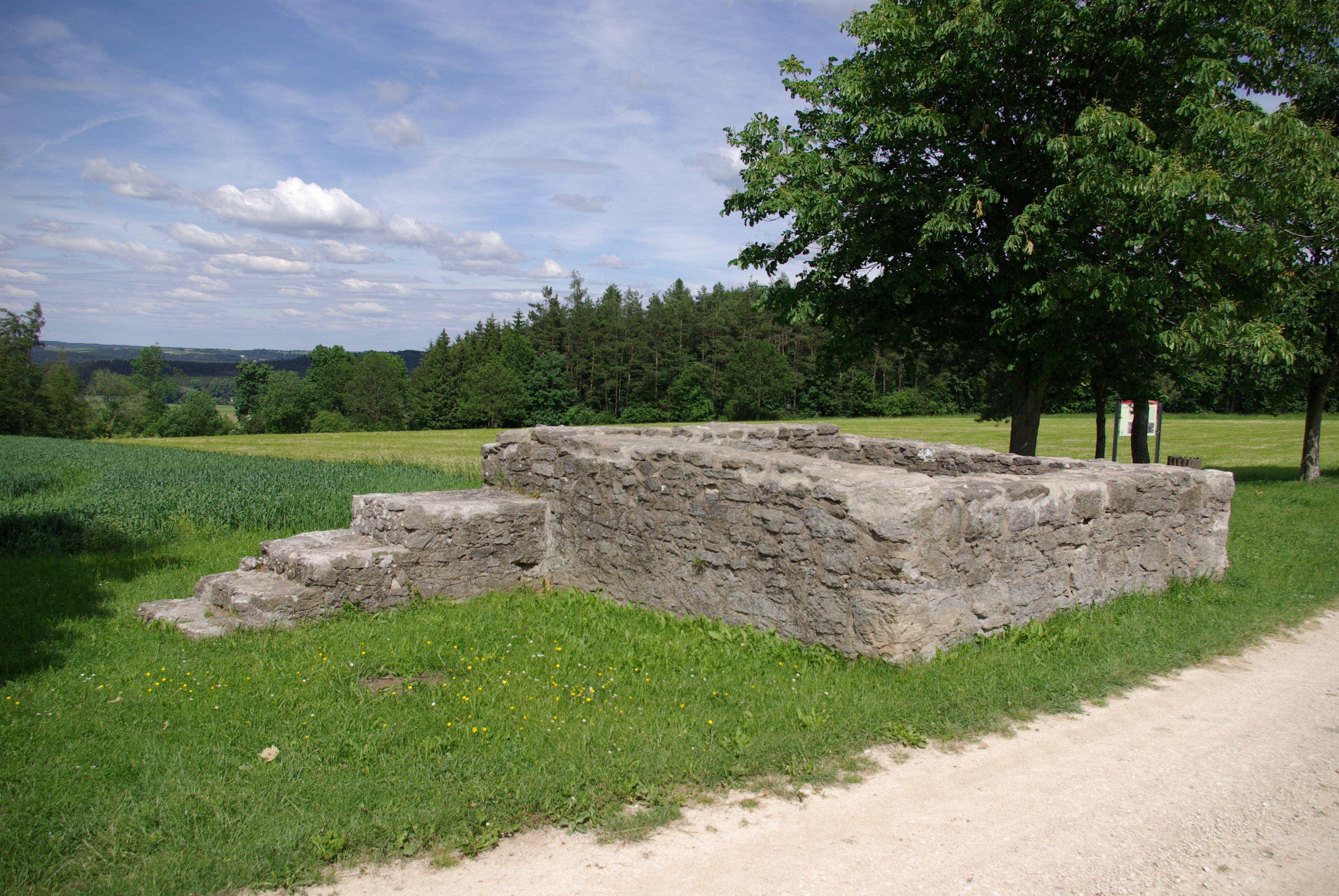 Wachturm WP 14/17 des Obergermanisch-Raetischer Limes bei Rittern in der Gemeinde Theilenhofen